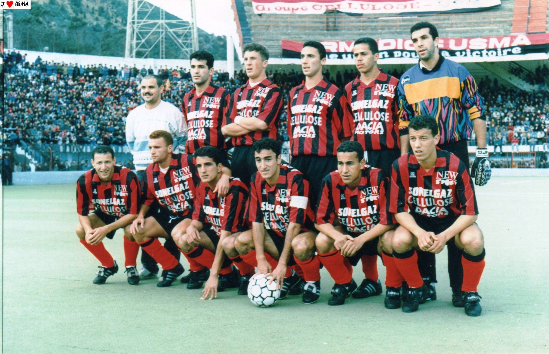 usmalger 1995